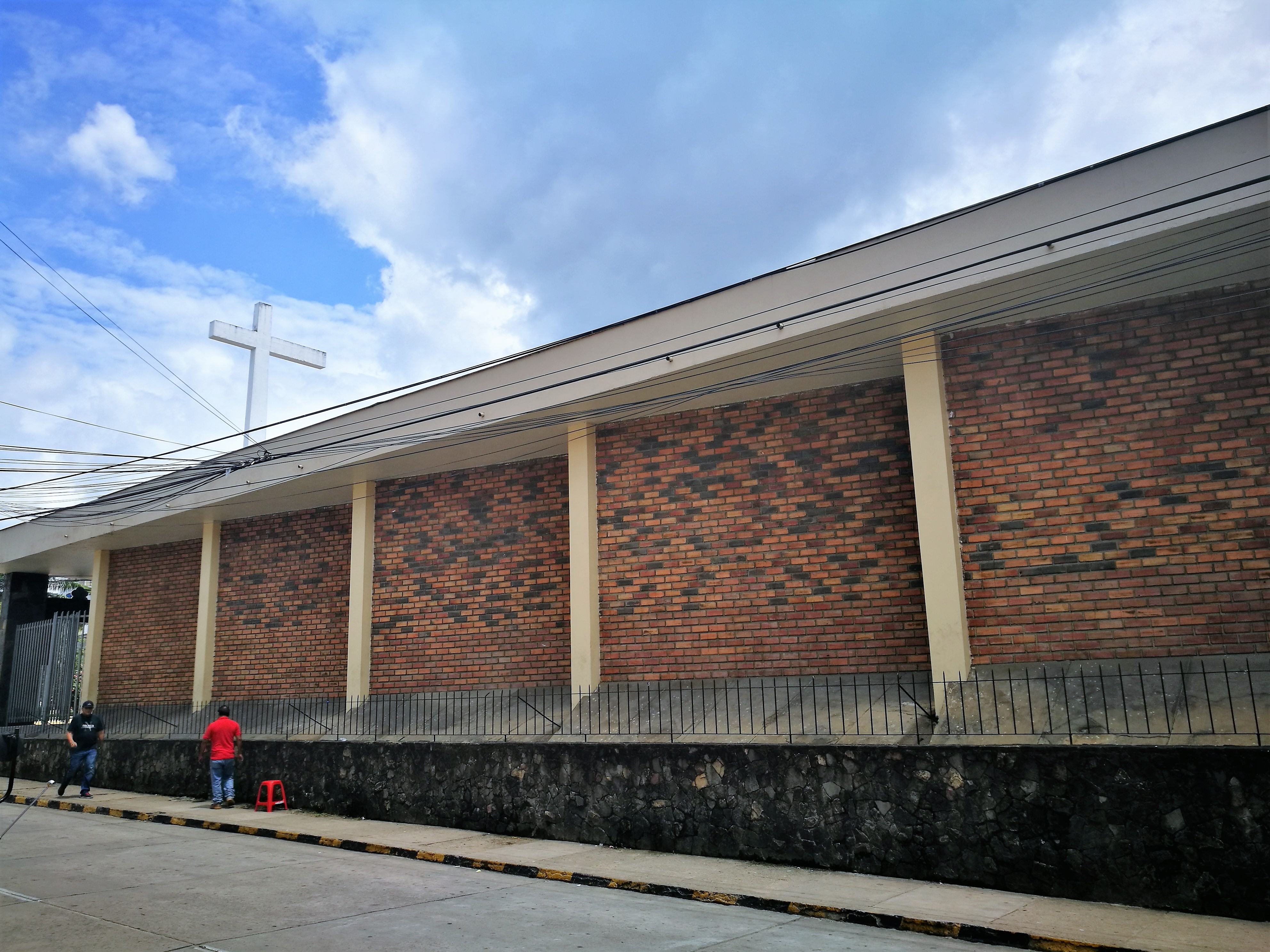 Pared lateral de l'església del Triunfo de la Santísima Cruz, Tarapoto